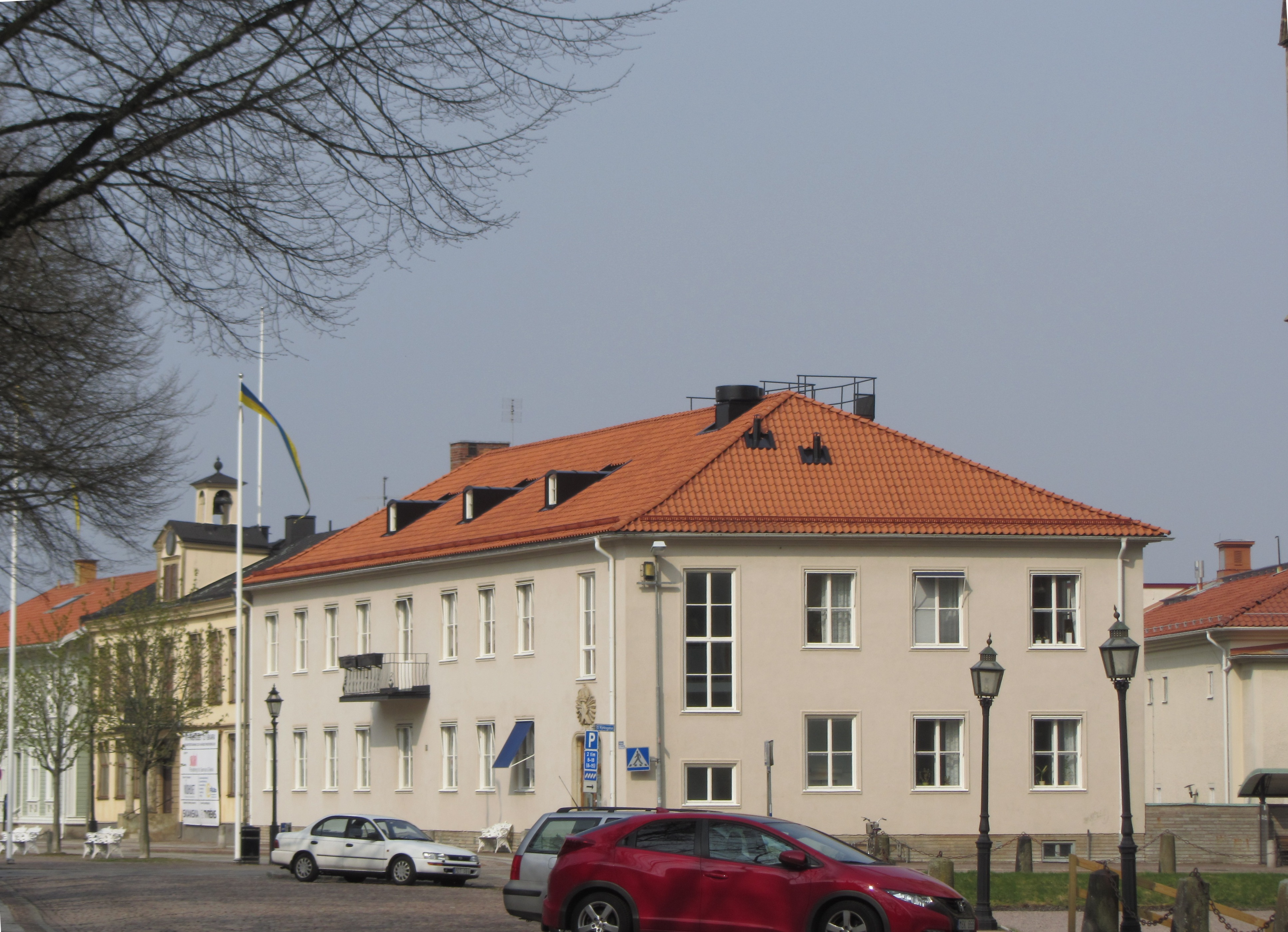 Stortorget och rådhuset i Skara.